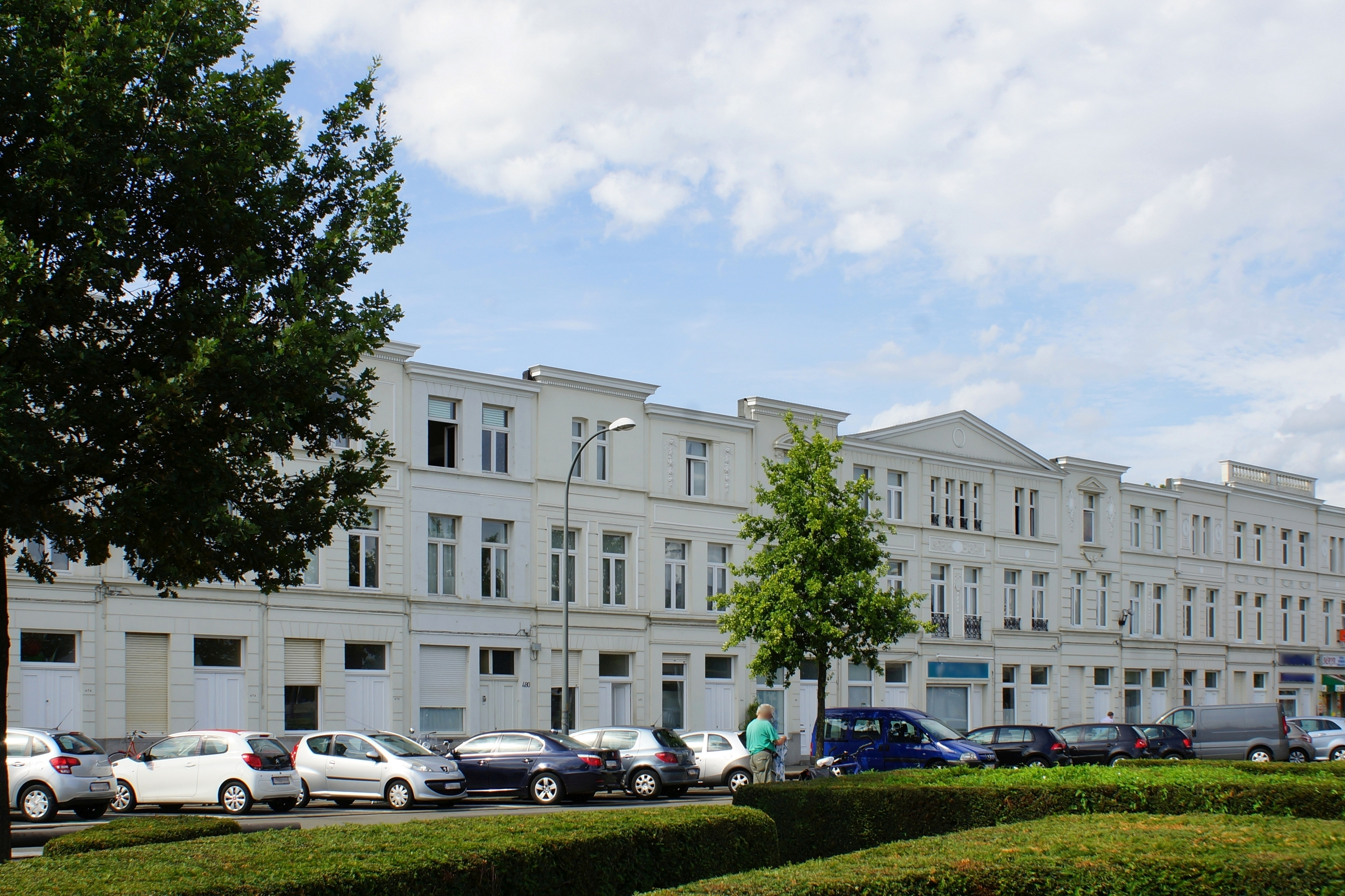 Eenheidsbebouwing te Berchem (Antwerpen), Uitbreidingsstraat 472 tot 508, ontworpen door architect Ernest Dieltiens.